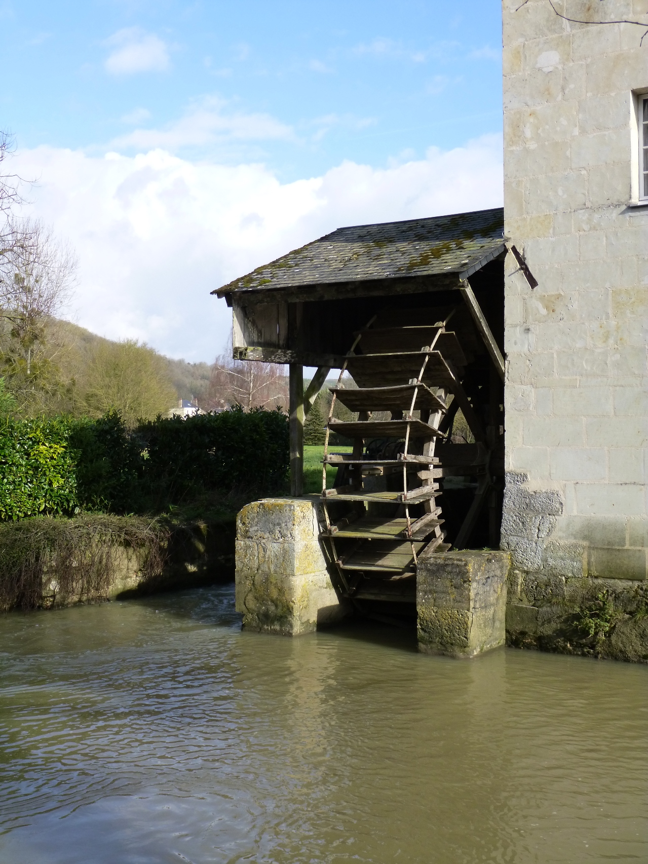 La roue du moulin de St-Jacques-des-Guérets